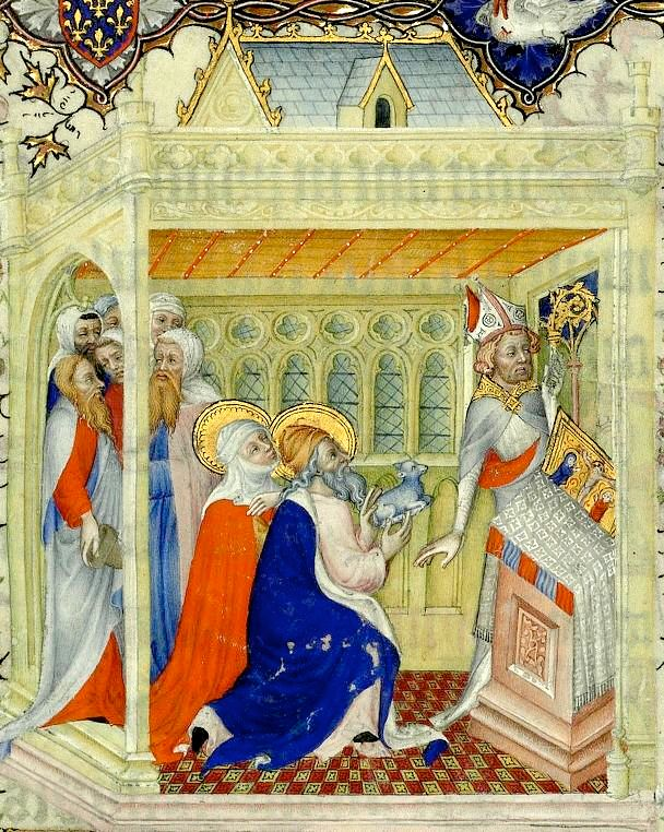 Grandes Heures du duc de Berry (BNF latin919) - Folio 8 Pontife refuse l'offrande de Joachim (détail)